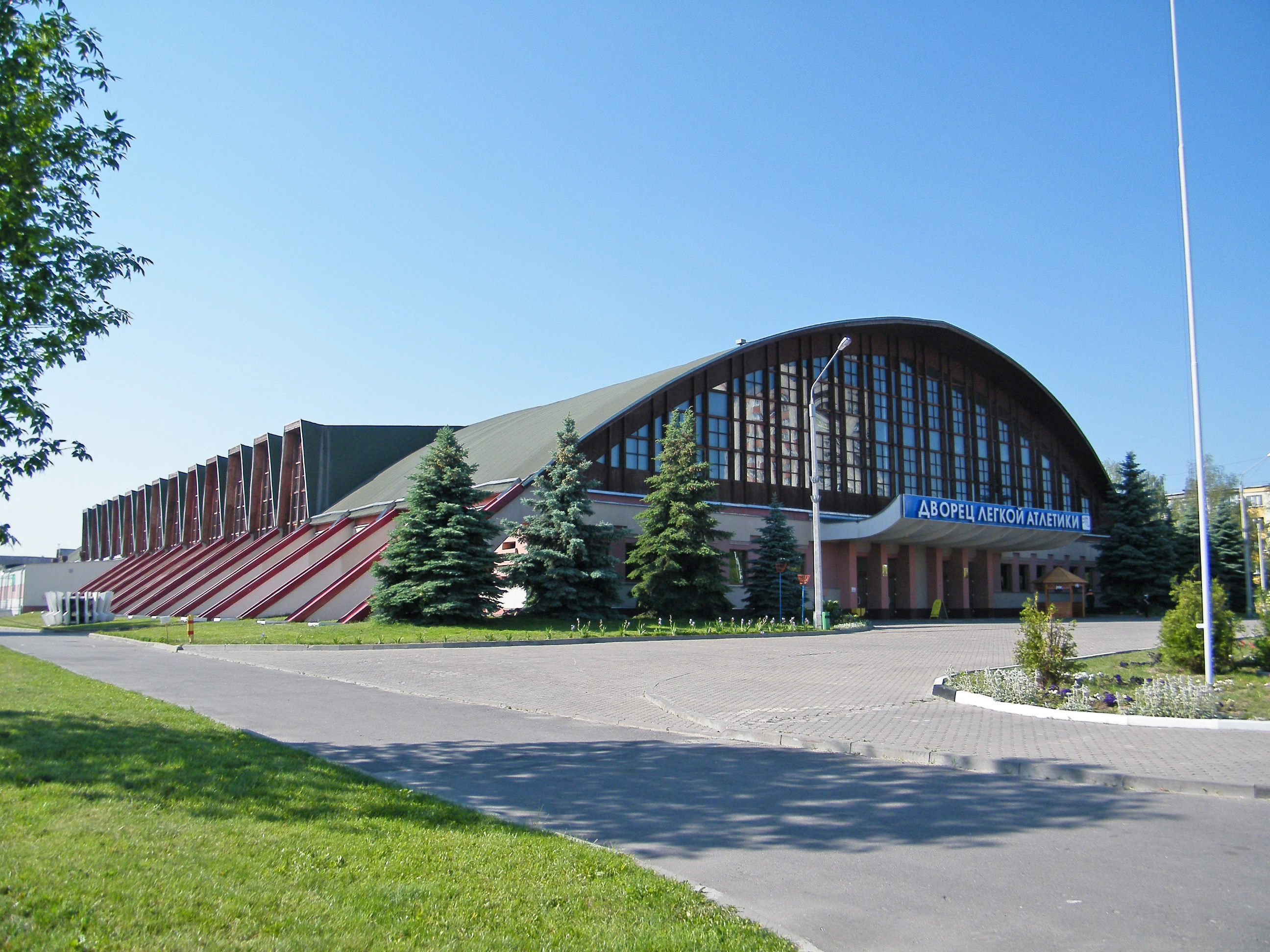 Дворец легкой атлетики